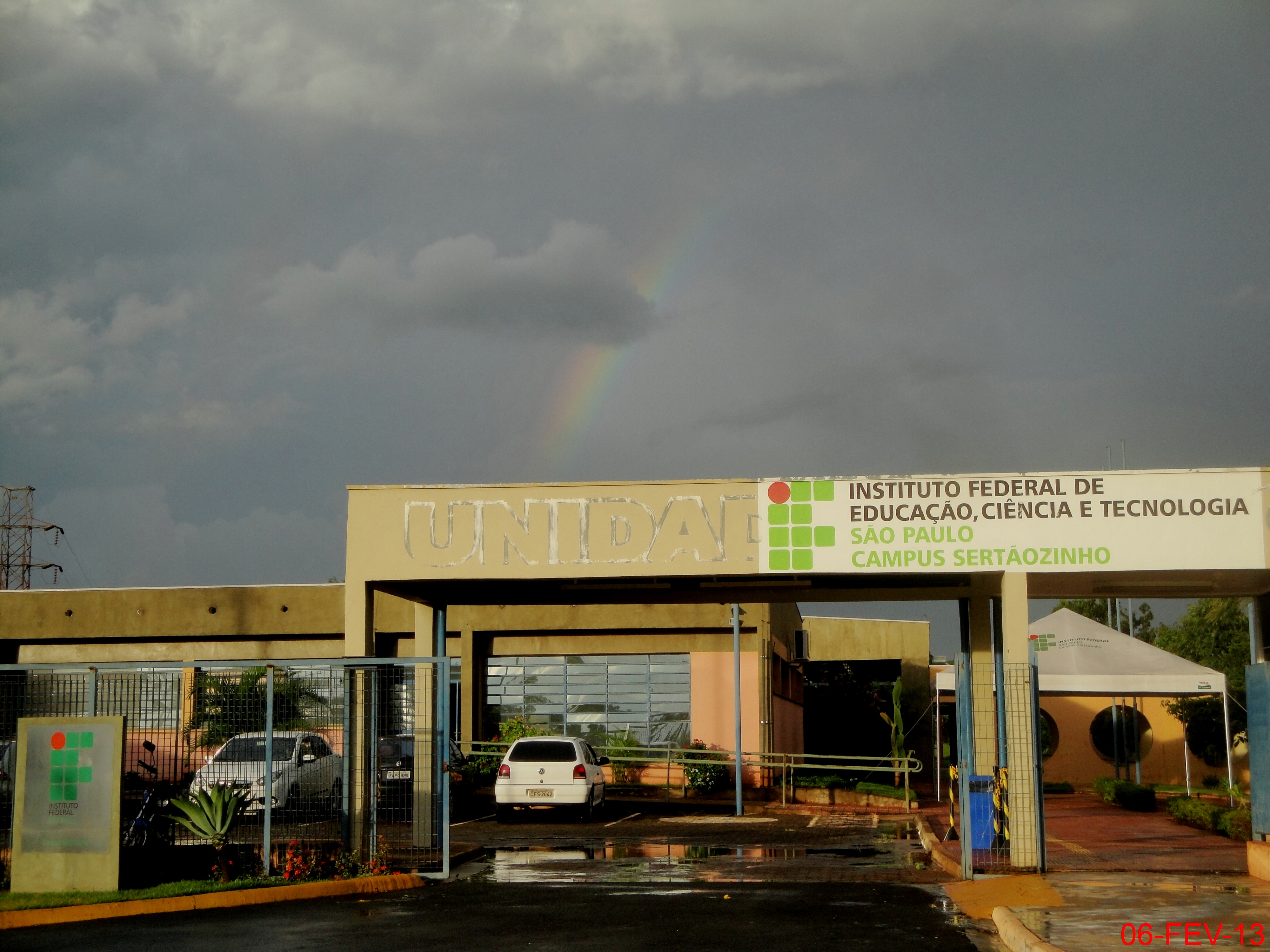 Instituto Federal de Educação, Ciência e Tecnologia de São Paulo. Campus Sertãozinho. Rua Américo Ambrósio, 269 - Jardim Canaã - Telefone-16-3946-1170